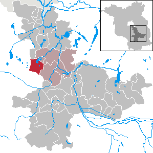 Teupitz in Brandenburg (Country) - District Dahme-Spreewald